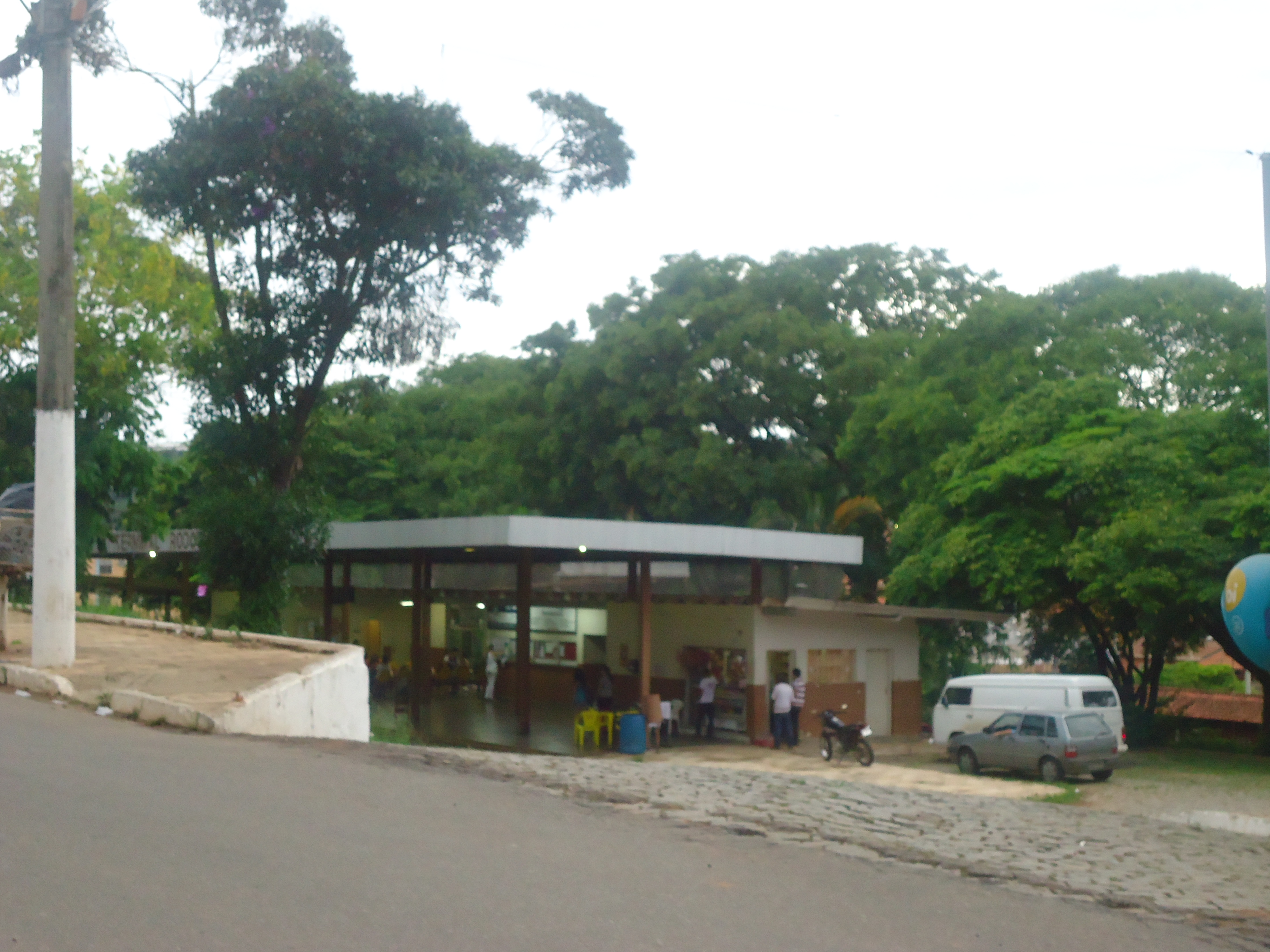 Rodoviária